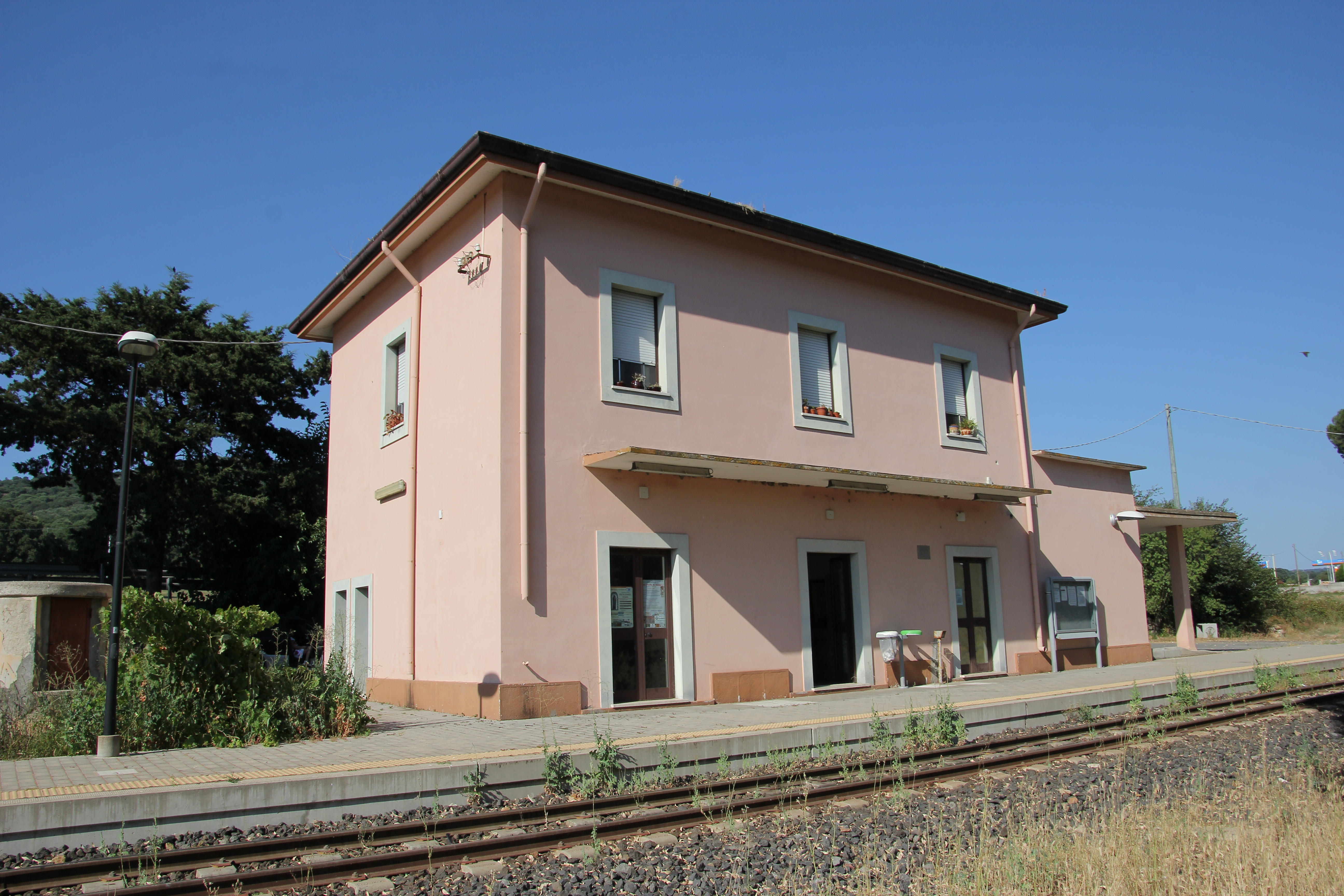 Orotelli, stazione ferroviaria